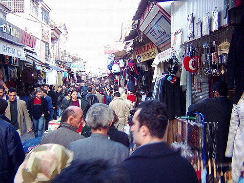 Kemeraltı Çarşısı 2006